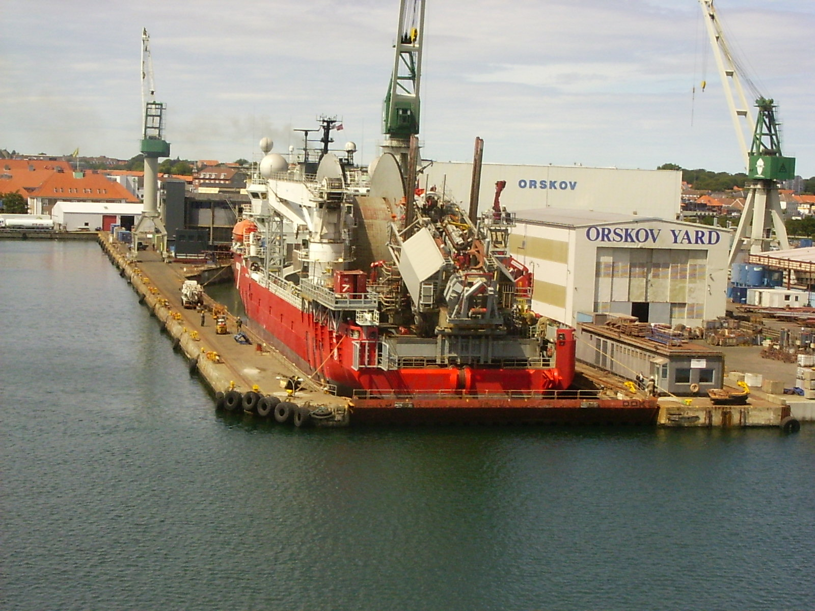 Leidinglegger Seven Navica in Frederikshavn